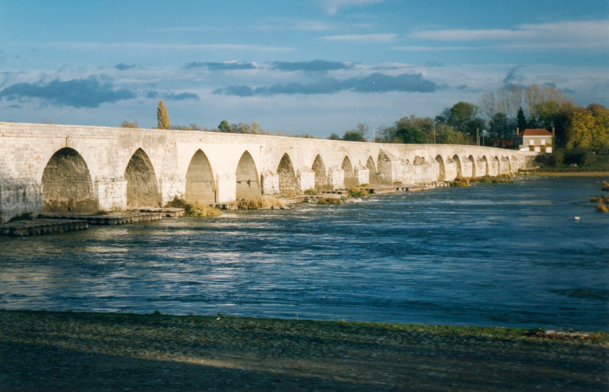 El puente en disputa, perfectamente conservado. France Loiret Beaugency Pont sur la Loire Photographie prise par GIRAUD Patrick